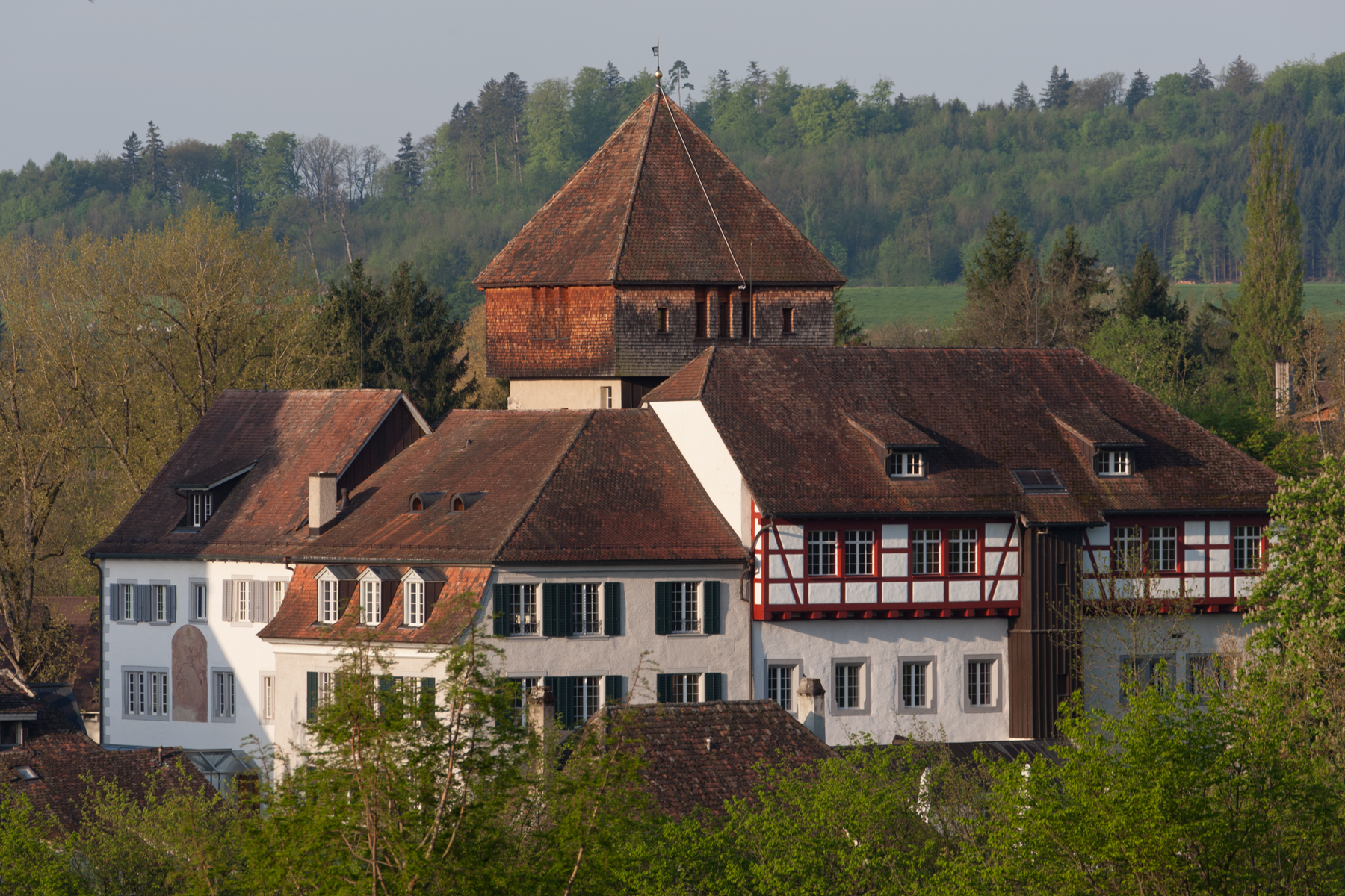 Burg und Unterhof von Diessenhofen